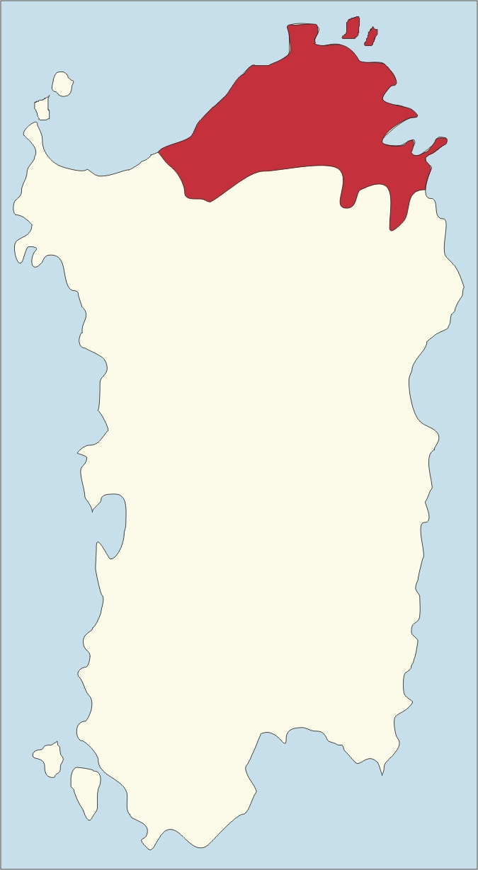 Mapa de la situació de la diòcesi de Tempio-Ampurias a Sardenya